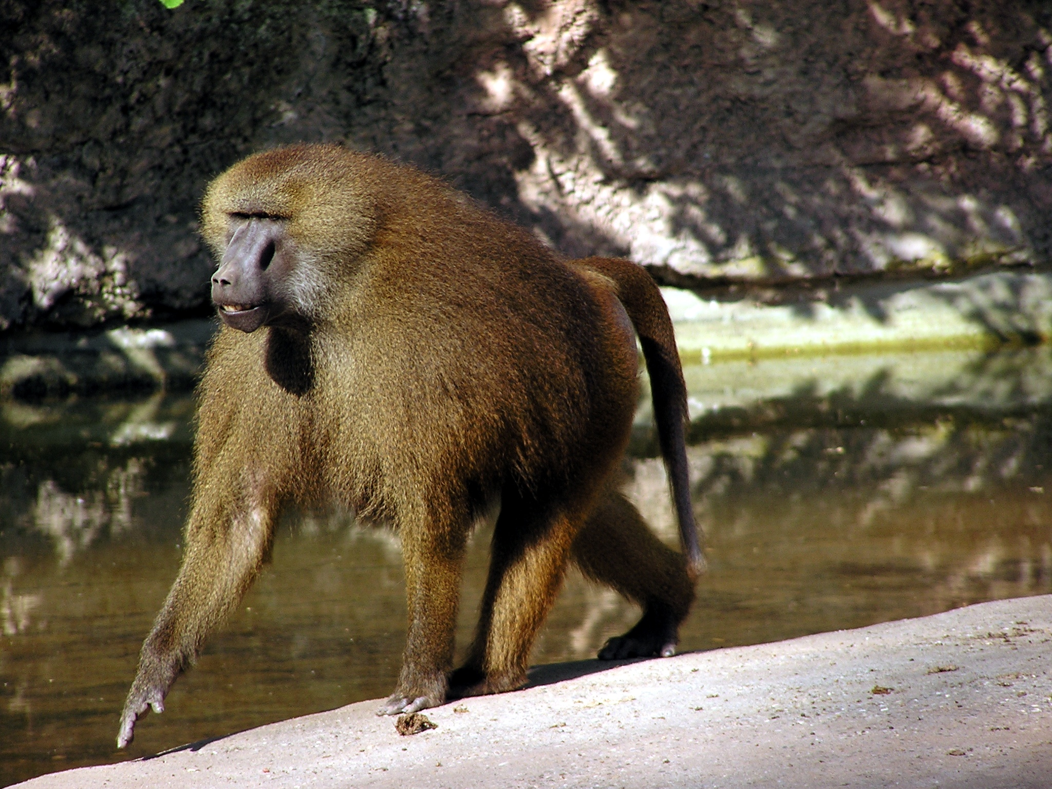 Guinea baboon (Papio papio) in Nuremberg zoo. I think this one is male. Pavián guinejský (Papio papio) v norimberské zoo. Myslím, že se jedná o samce.